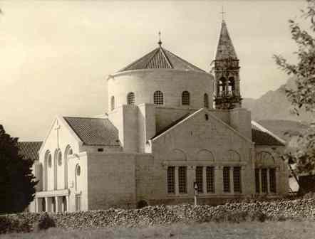 Franjevačka crkva u Makarskoj